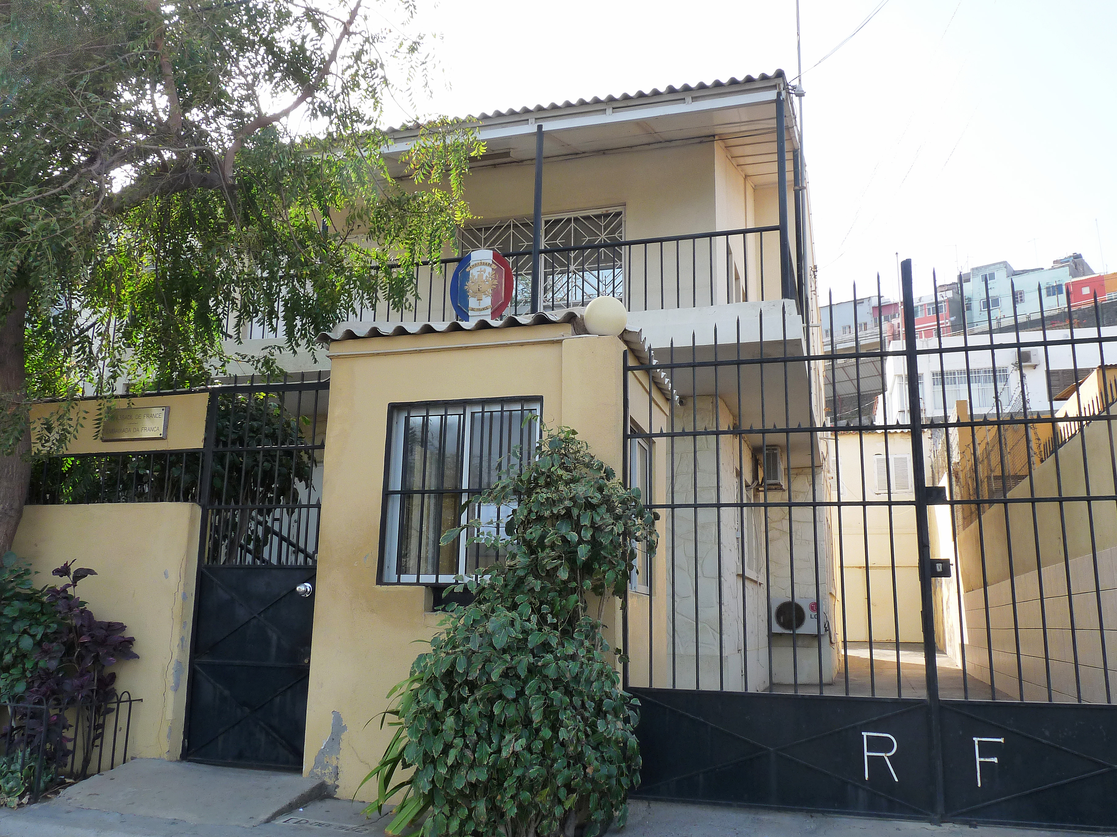 Ambassade de France à Praia (Cap-Vert)